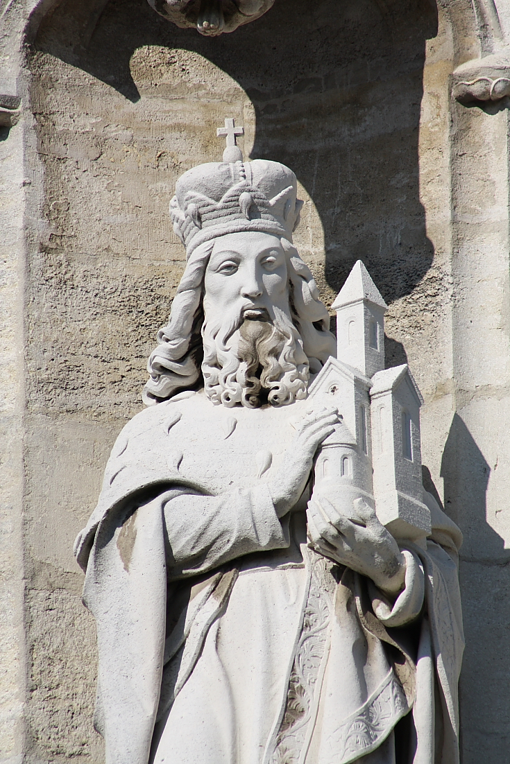 Leopoldstatue mit Modell der ursprünglichen Basilika an der Außenseite des Südwestturmes der Stiftskirche Klosterneuburg